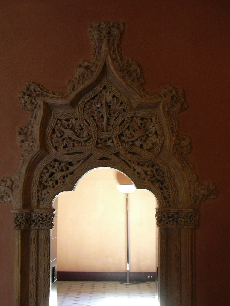 La Aljafería - Sala del trono - Puerta